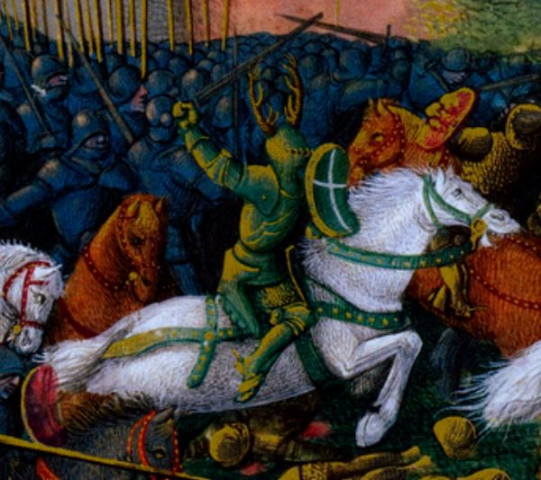 სანჩო მარტინი, ესპანელი რაინდი